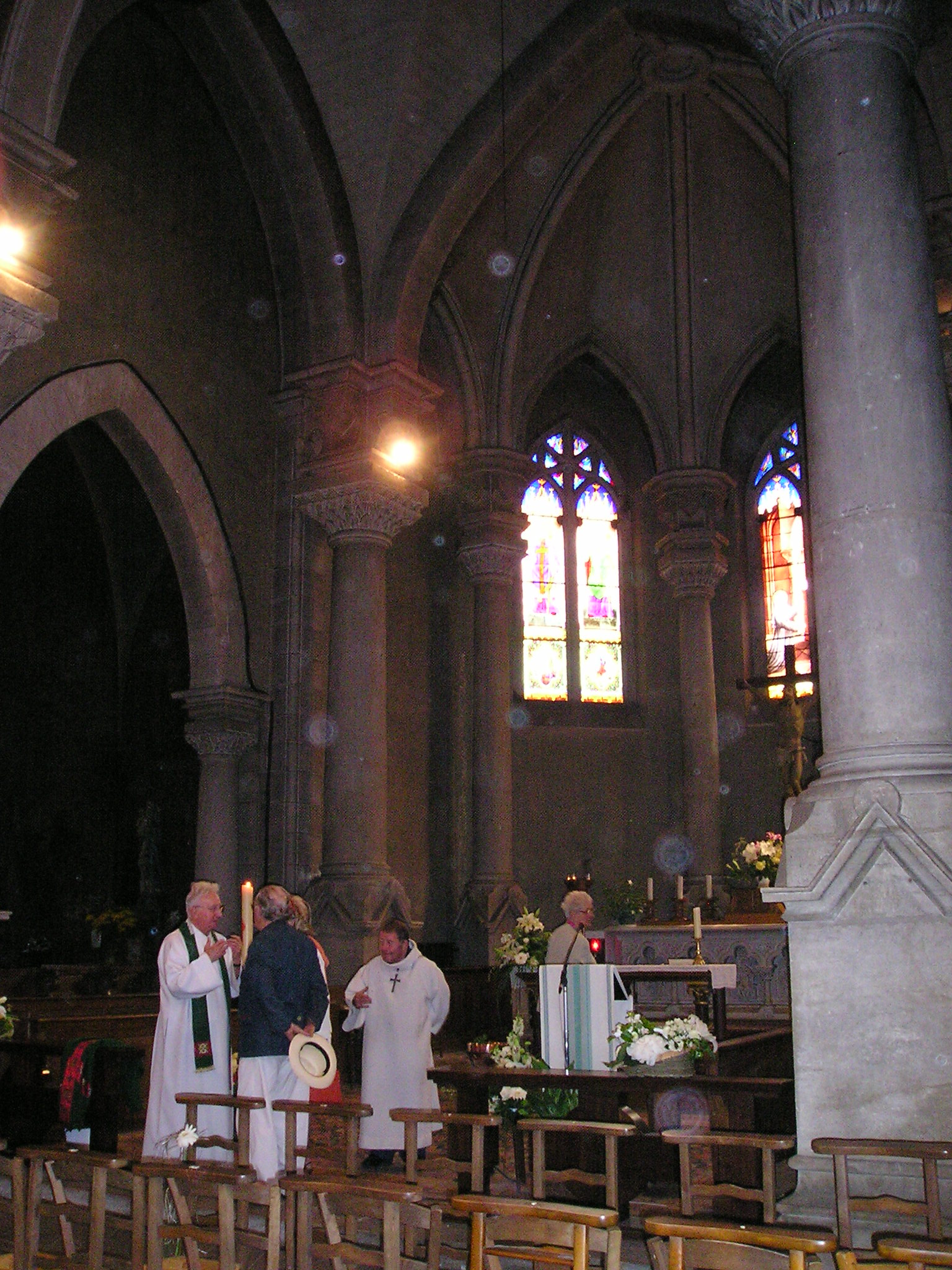 In_der_Kirche_von_Cosne_d'Allier